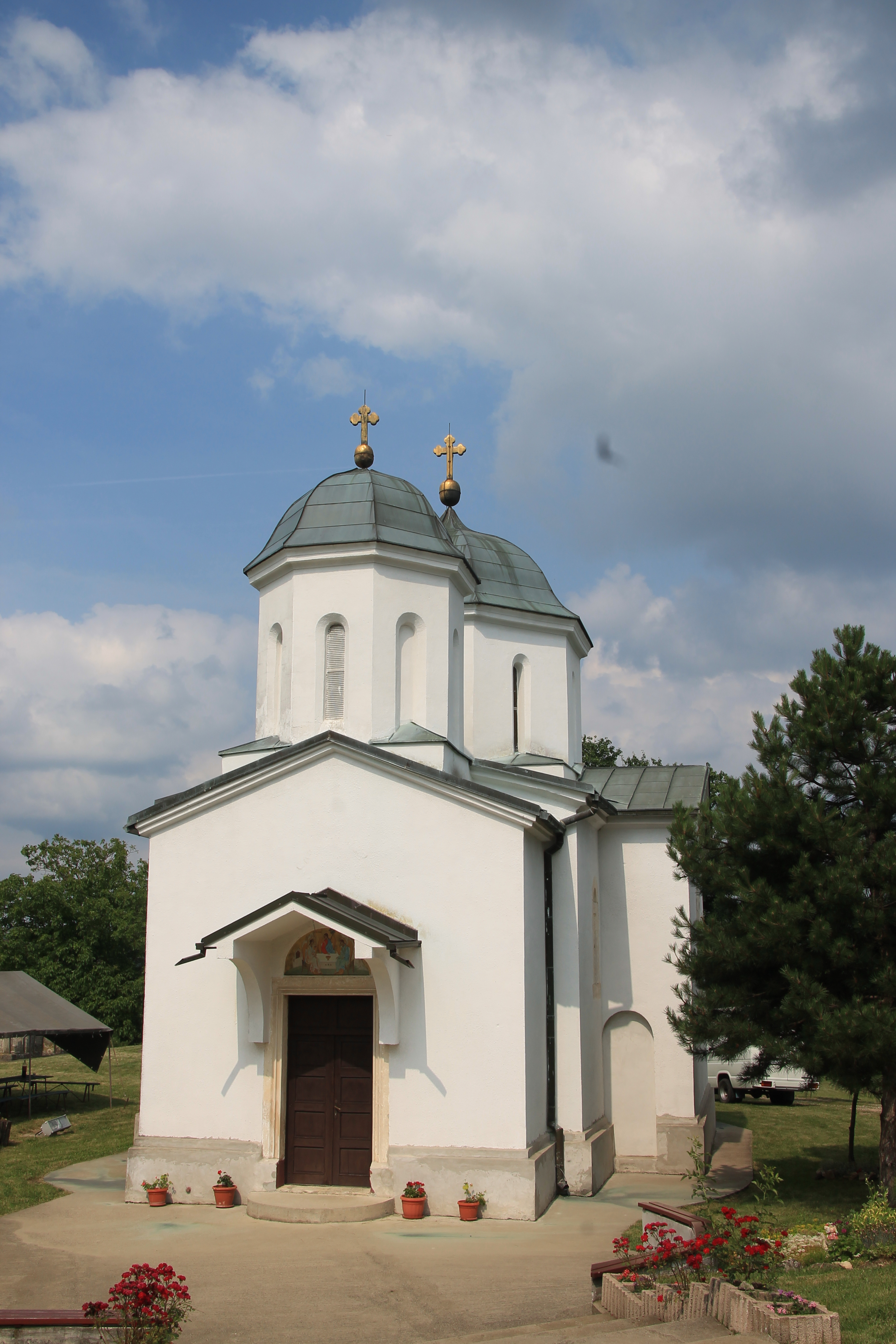 Crkva Svete Trojice (Baćevac)